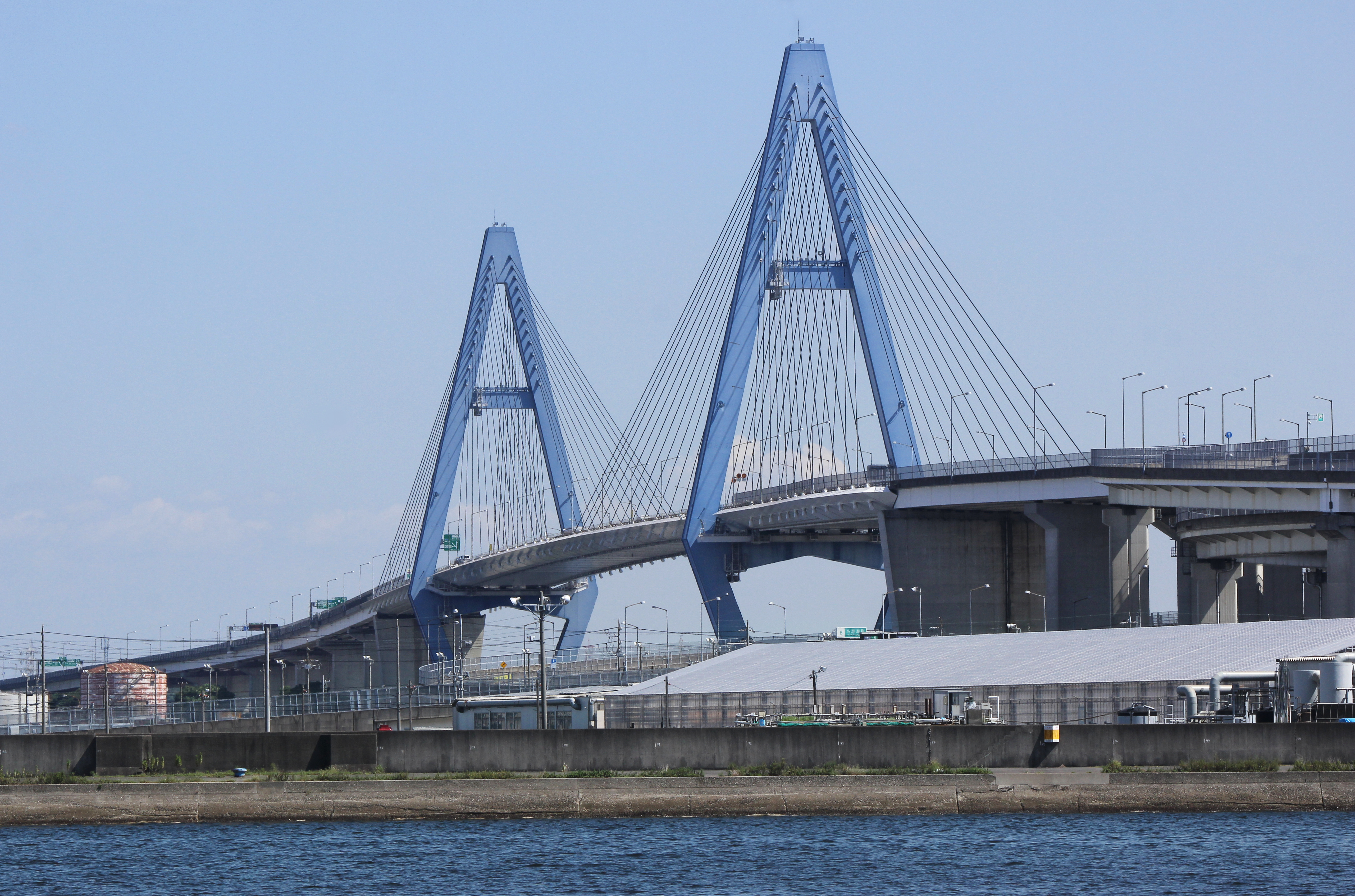 名港東大橋 水上バスから撮影